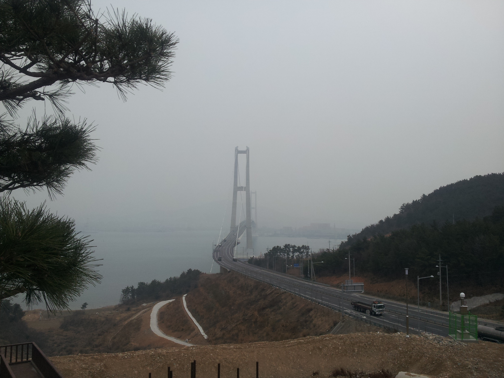 이순신 대교